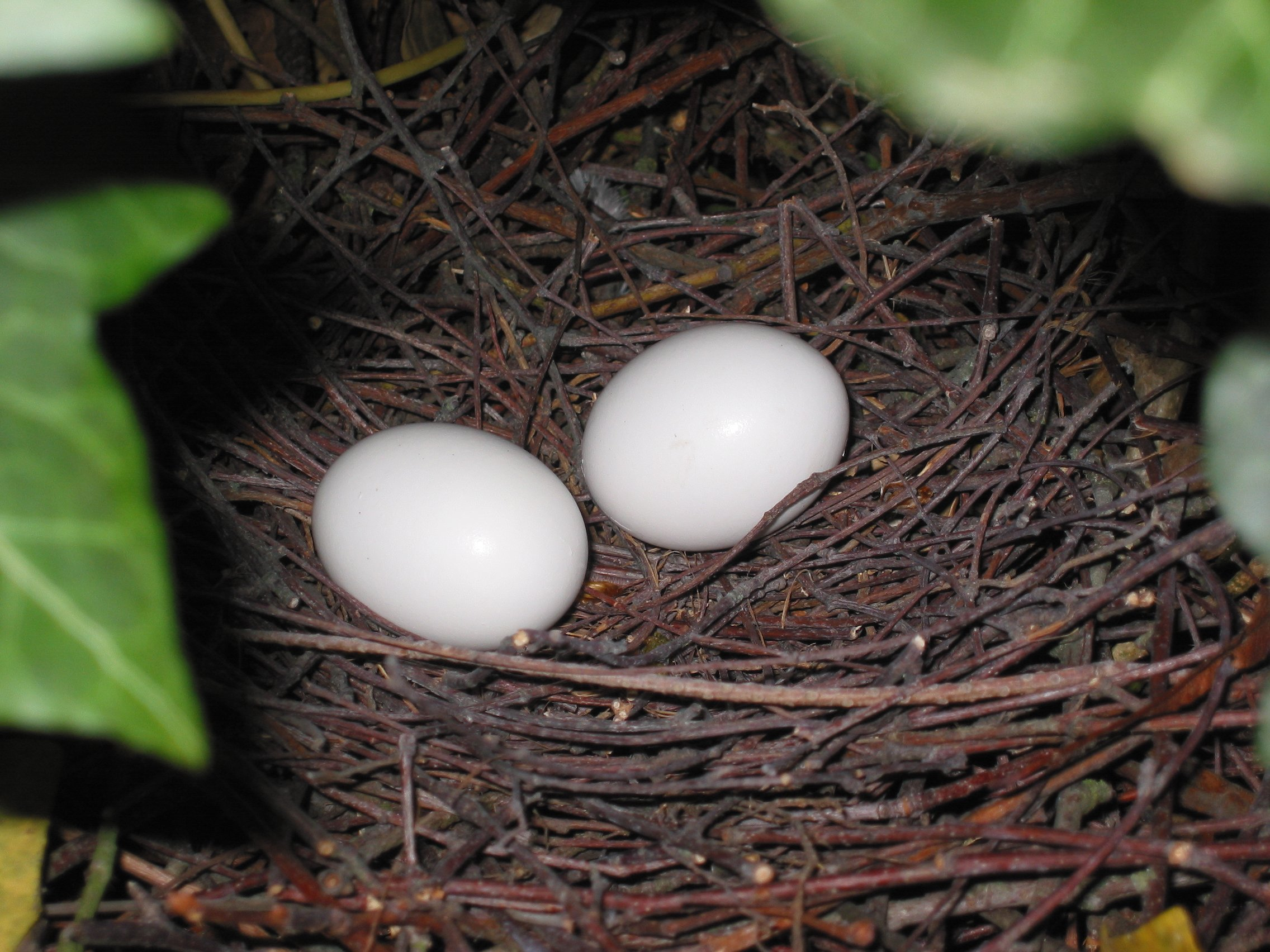 Houtduifnest) Columba palumbus nest with eggs